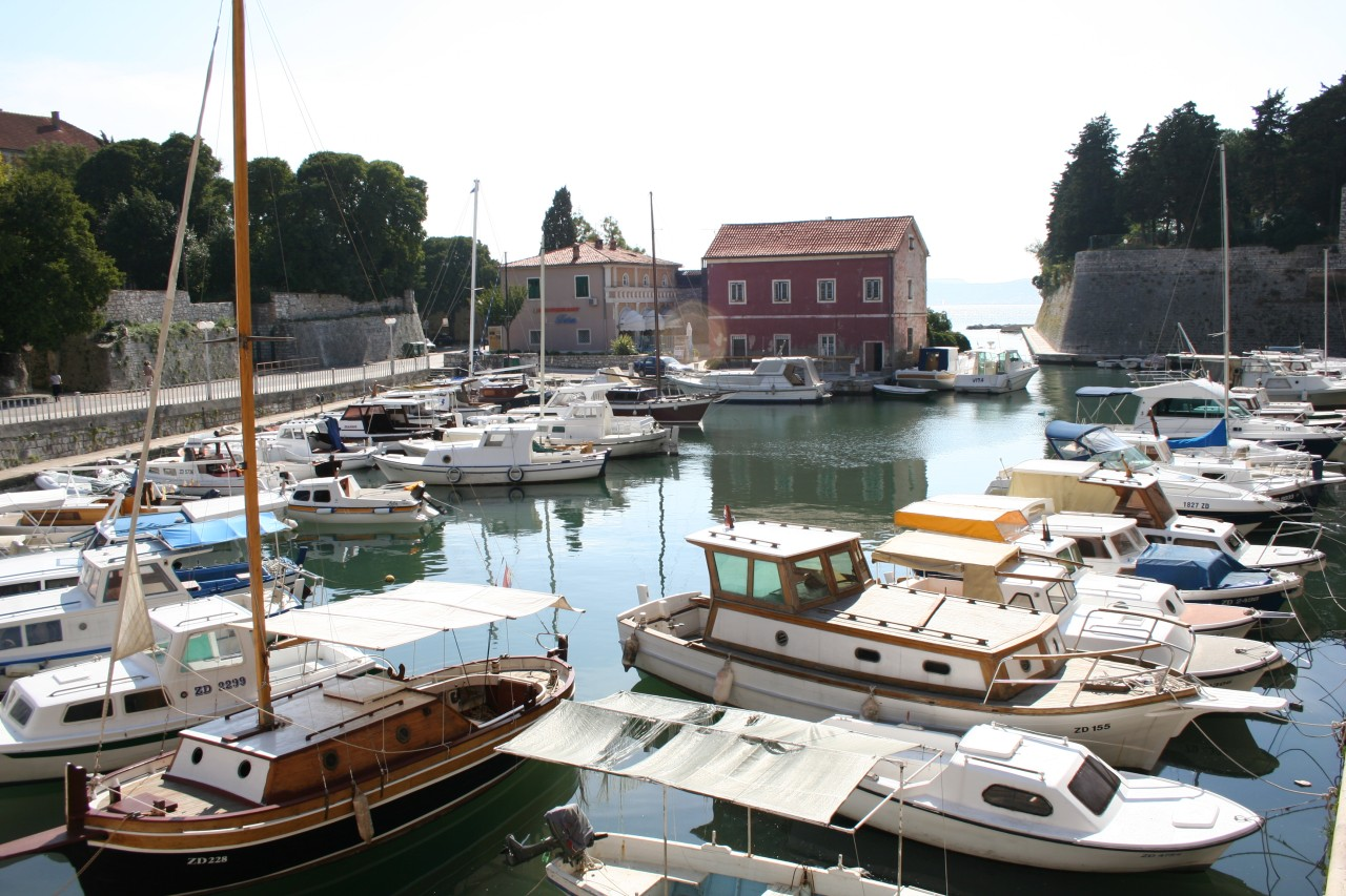 Maciej Piekielnik, przystan w Zadarze (harbour Foša)